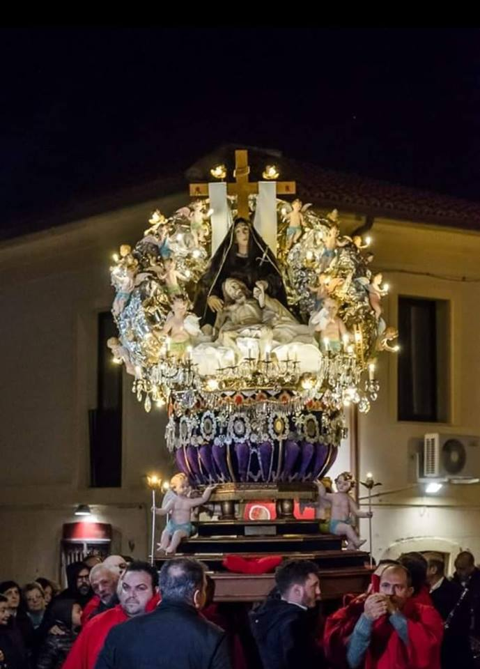 Tradizionale processione della Naca per le vie del paese